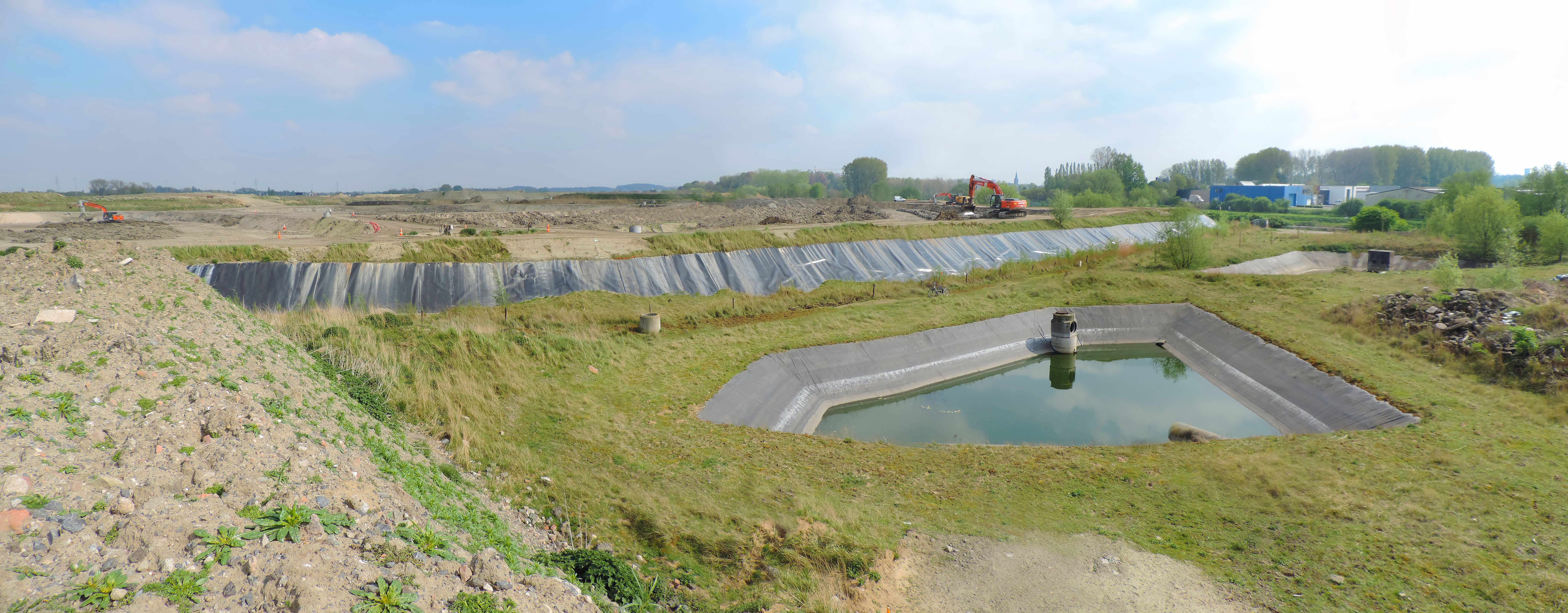 Eiland Zwijnaarde, Zone Zuid aan de voet van de toekomstigeLandschapsheuvel (op de achtergrond) en aan een paar kunstmatige waterbekkens